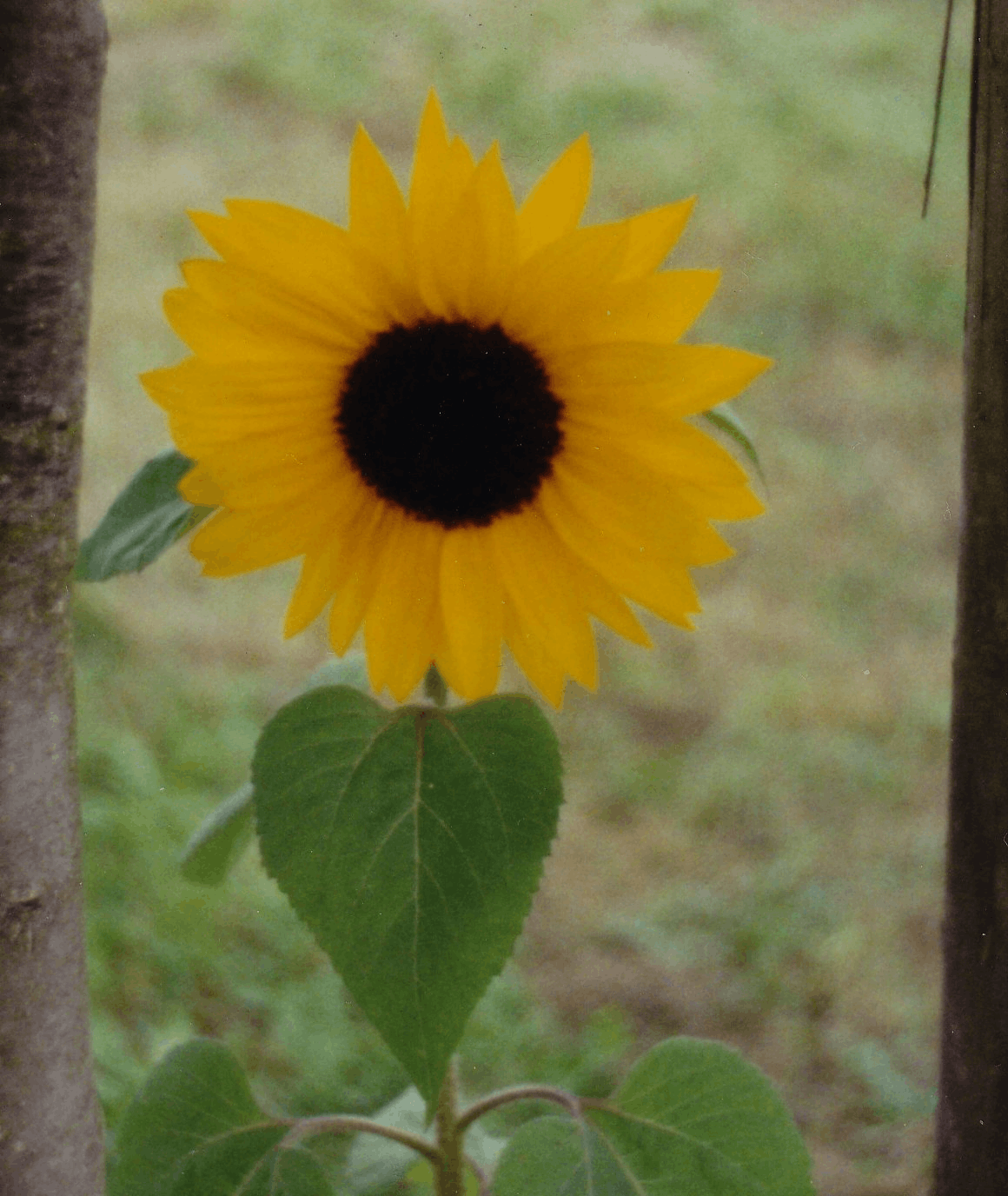 Flower of a Sunflower as GIF(Graphics Interchange Format) photo / Die Blüte einer Sonnenblume als GIF (Graphics Interchange Format) Foto.